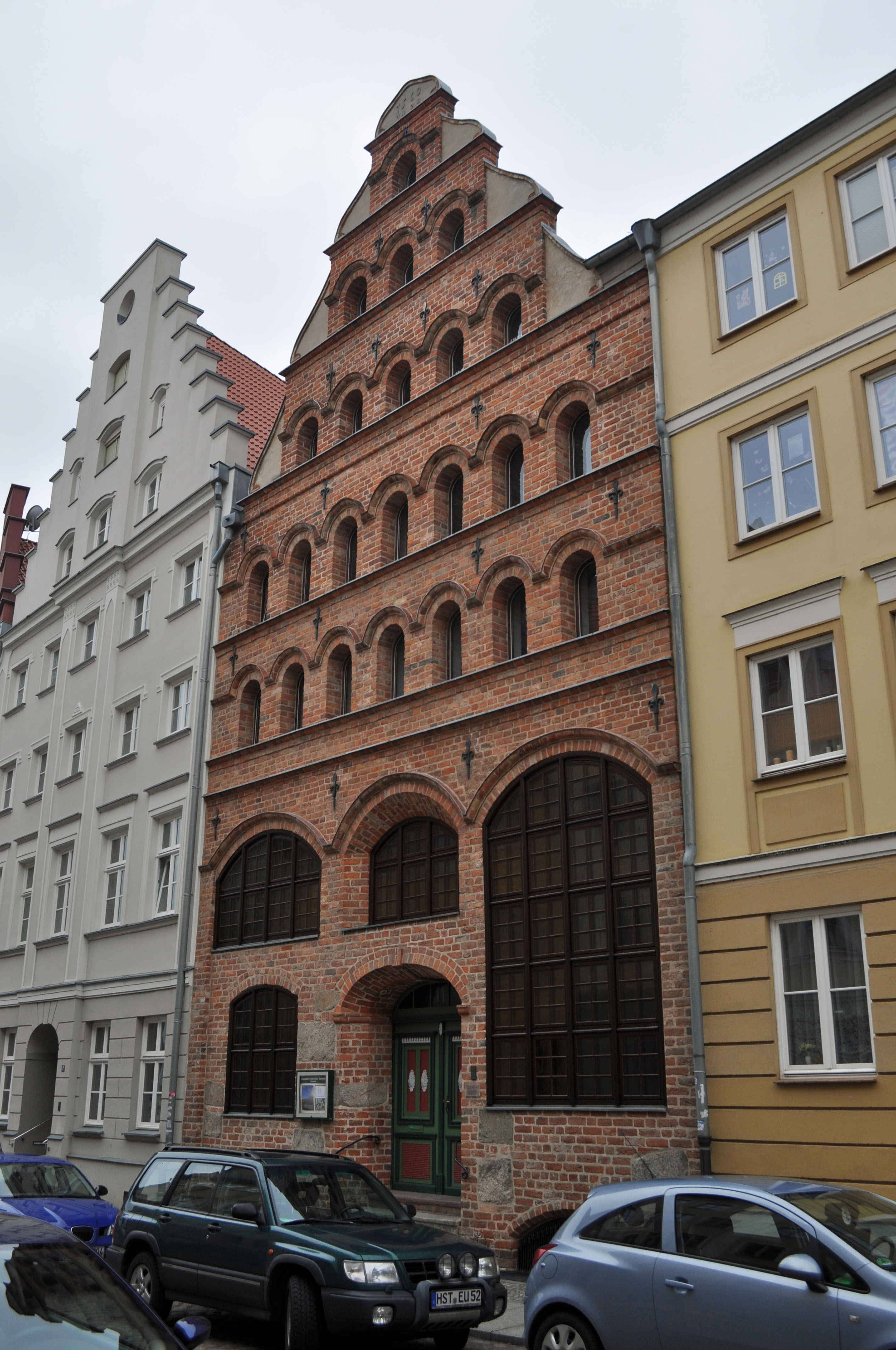 Gebäude bzw. Gebäudedetail in Stralsund. Straße und Hausnummer siehe Dateiname.